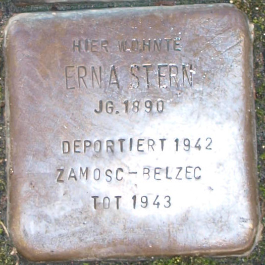 Stolperstein in Soest Grandweg 30, Erna Stern